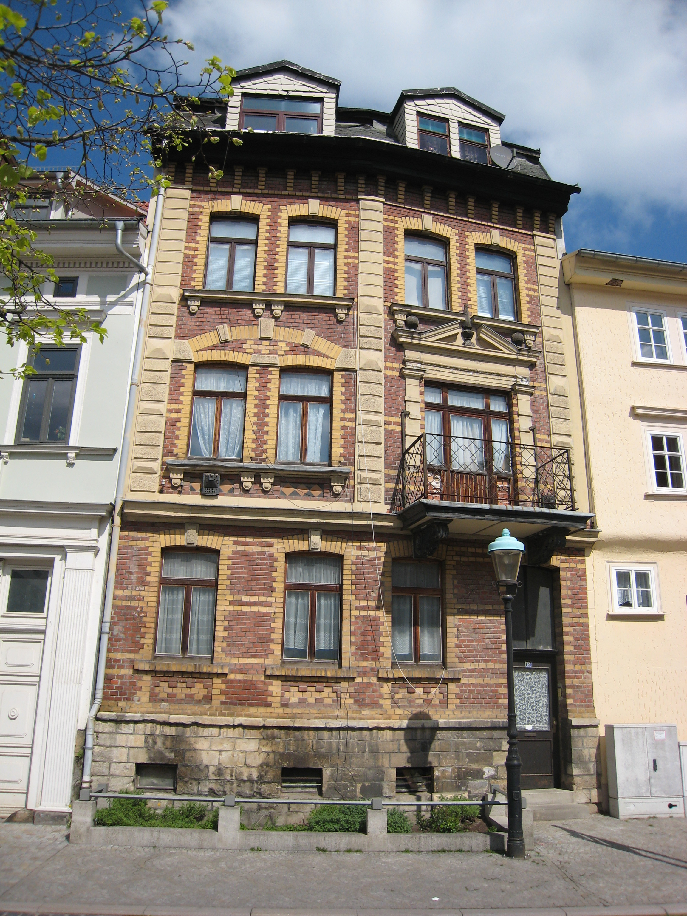 Haus in der Zimmerstraße 18 in Arnstadt, wo Mitglieder der Bachfamilie wohnten.